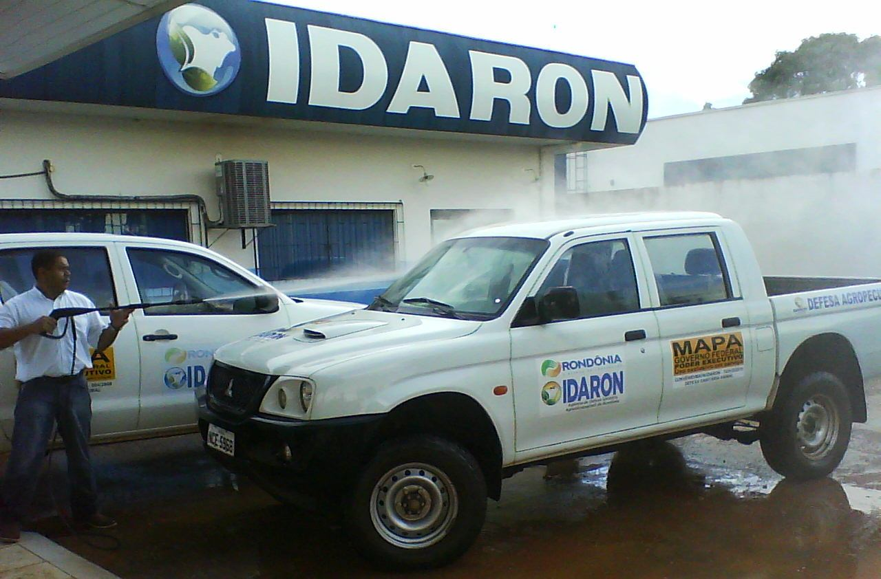 Lavando Viatura L-200 IDARON da Unidade de Espigão do Oeste